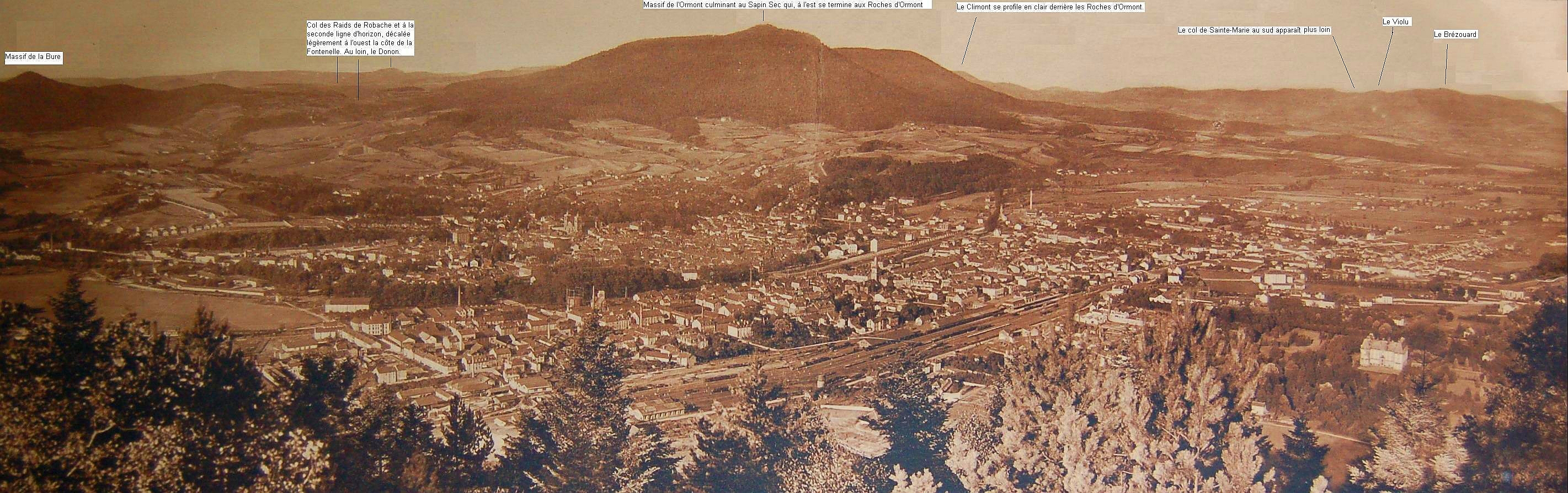 Thème : Saint-Dié en 1935/1936, petite ville industrielle des Vosges aux multiples cheminée d'usines.... Point de vue : depuis les traditionnelles roches Saint-Martin du massif du Kemberg où tous les amateurs avertis de photographie paysagère s'essayaient à la vue large de la ville de Saint-Dié surplombée. Photomontage à usage de localisation géographique et d'information historique, réalisé à partir de cliché numérique de photographies anciennes.